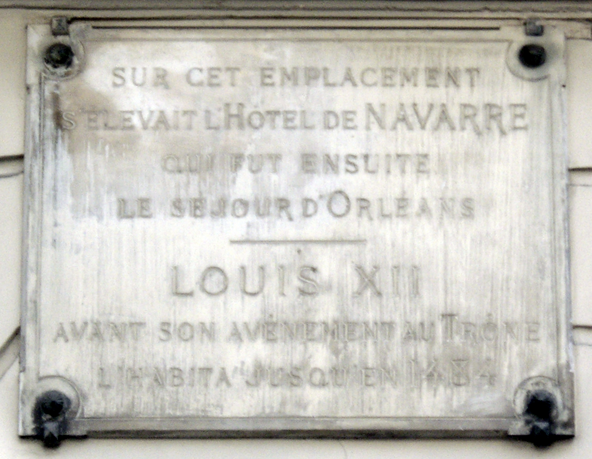 Plaque apposée au n° 49 de la rue Saint-André-des-Arts, Paris 6e.« Sur cet emplacement s'élevait l'Hôtel de Navarre qui fut ensuite le séjour d'Orléans. Louis XII avant son avènement au Trône l'habita jusqu'en 1484. »